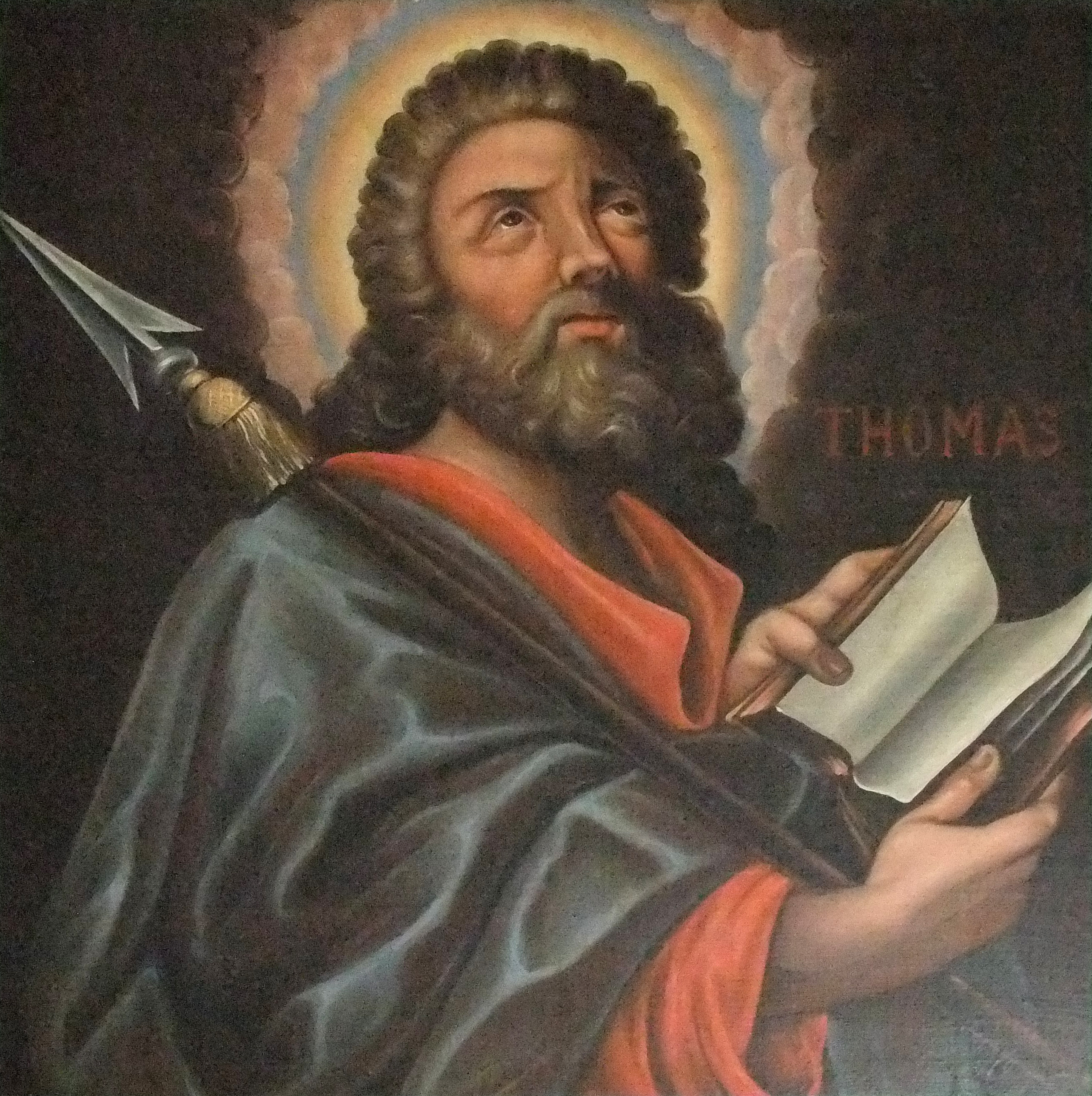 Wolfschlugen. 22: Apostel Thomas